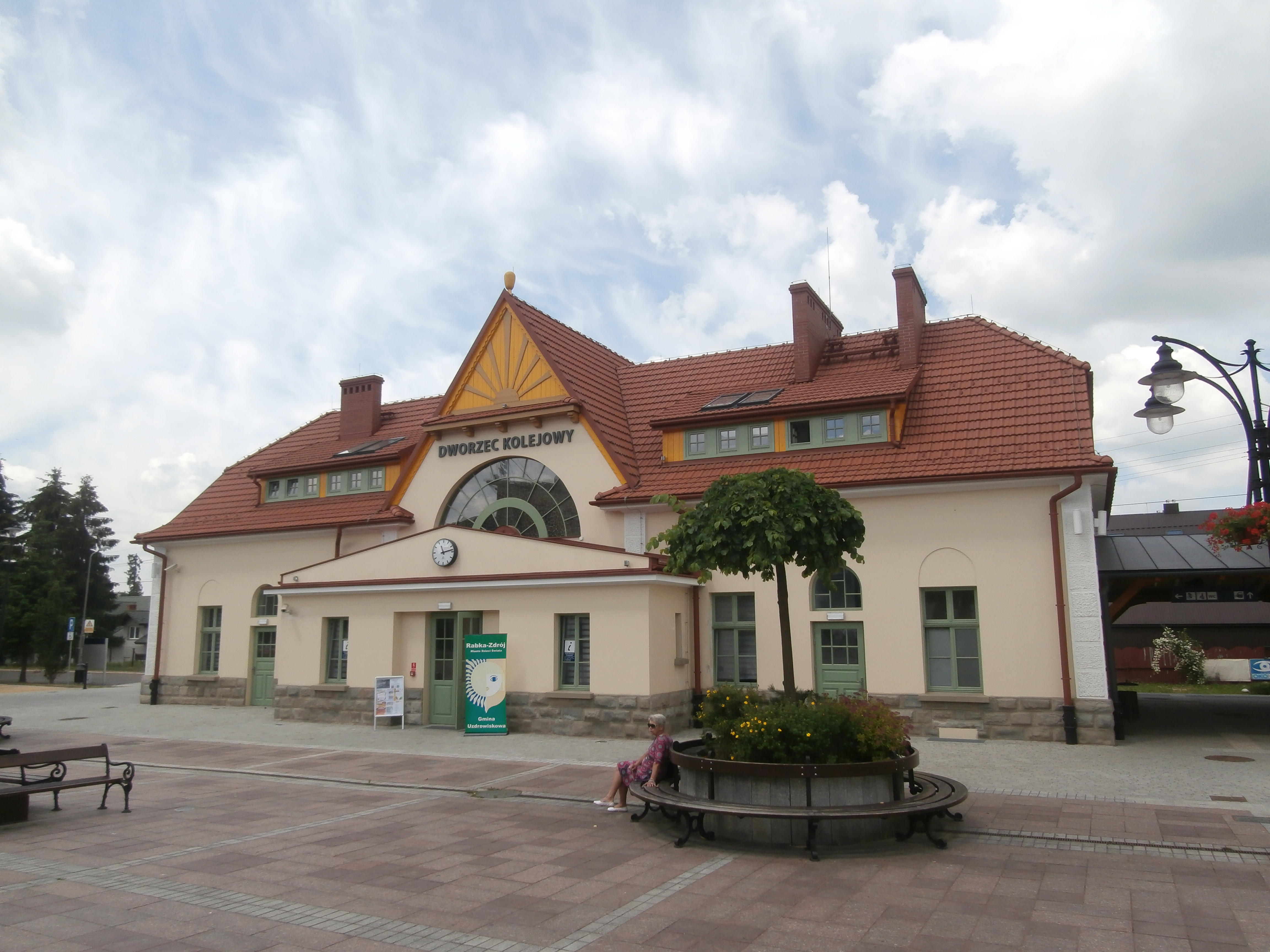 Dworzec PKP w Rabce, po remoncie, 2015.